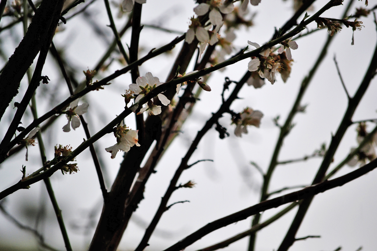 fiori di mandorla